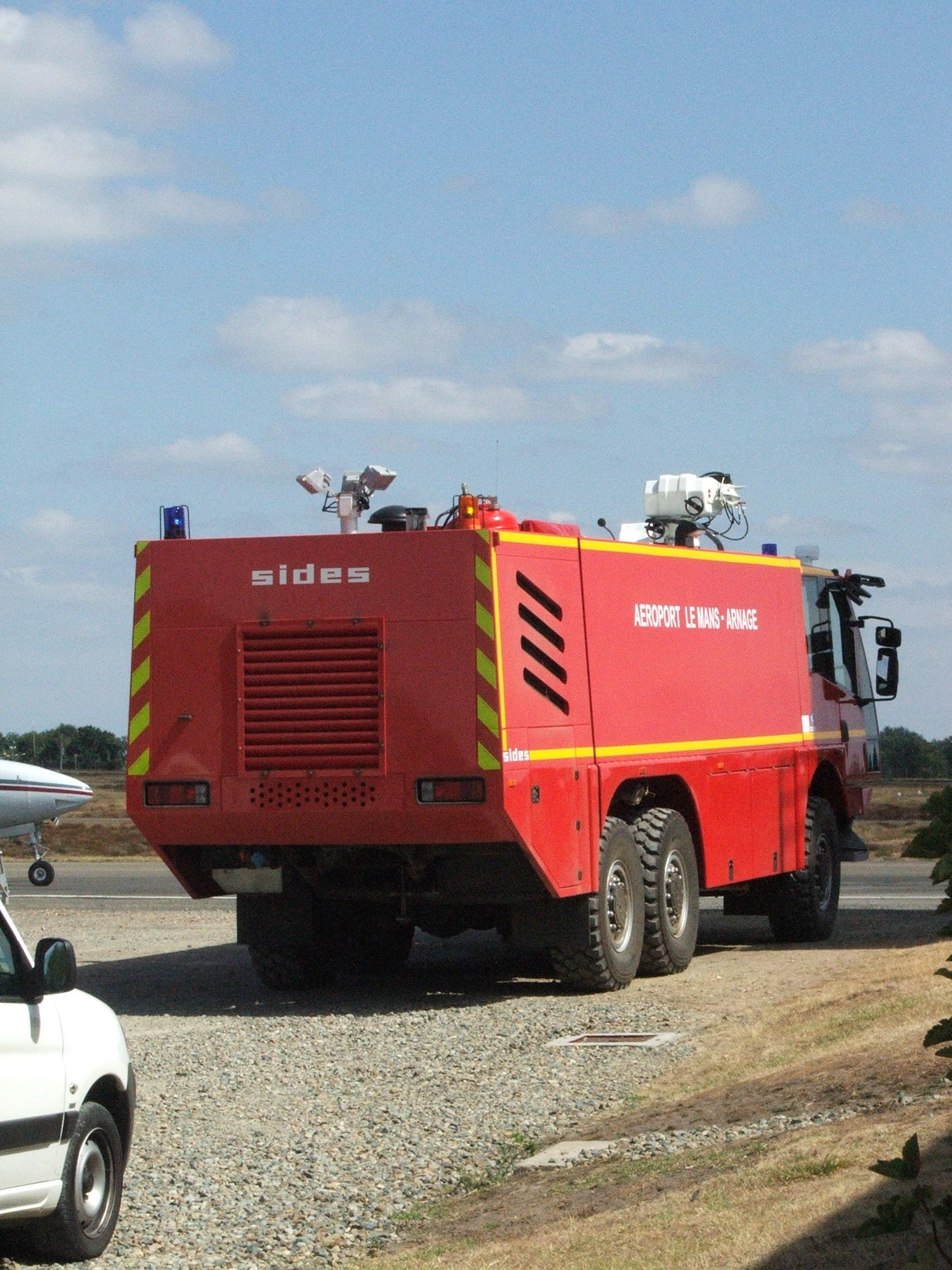 Un véhicule de pompier spécialisé sur le tarmac de l'aéroport du Mans-Arnage.